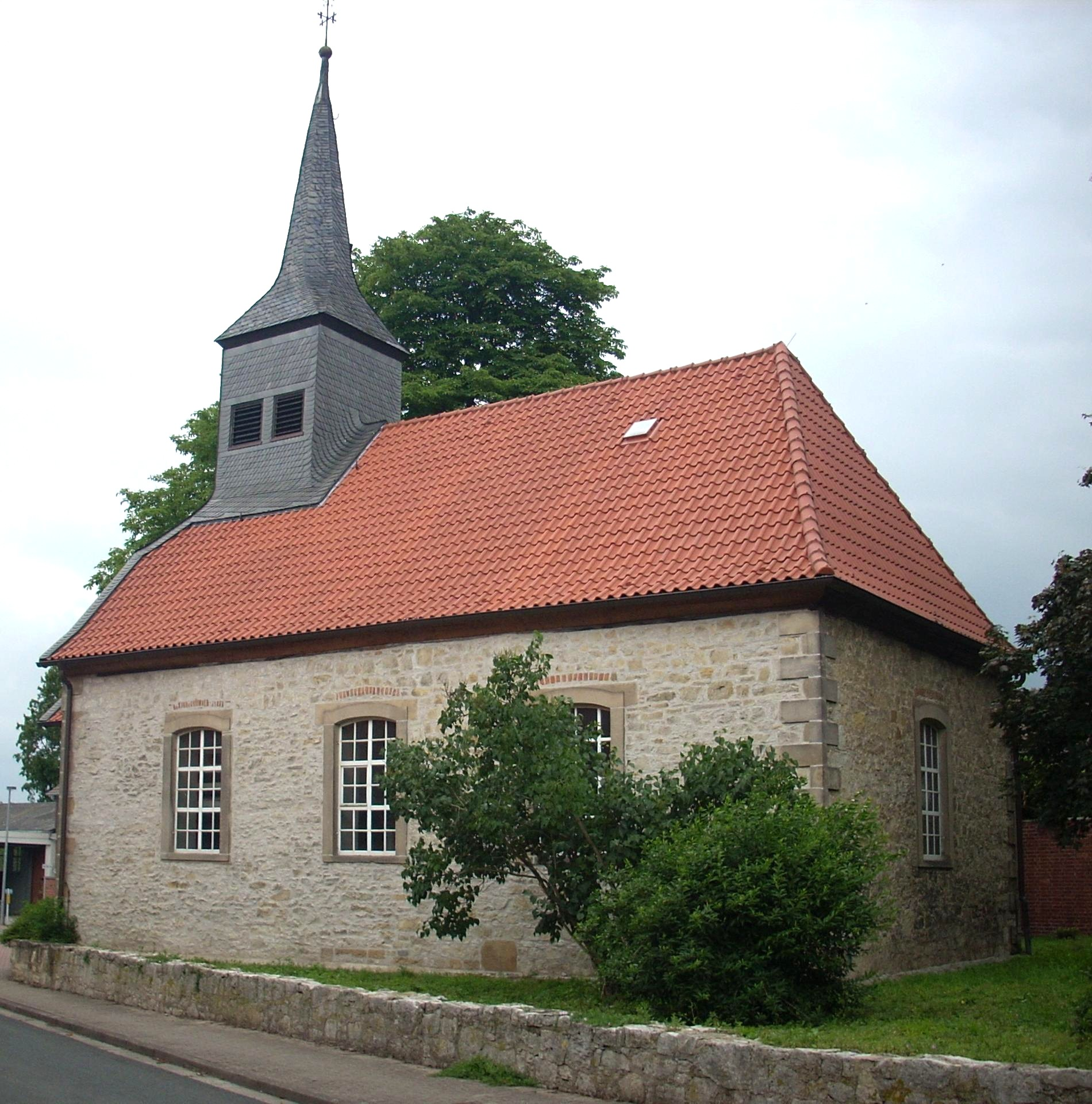 Ev. Kirche Wirringen, Sehnde, Germany